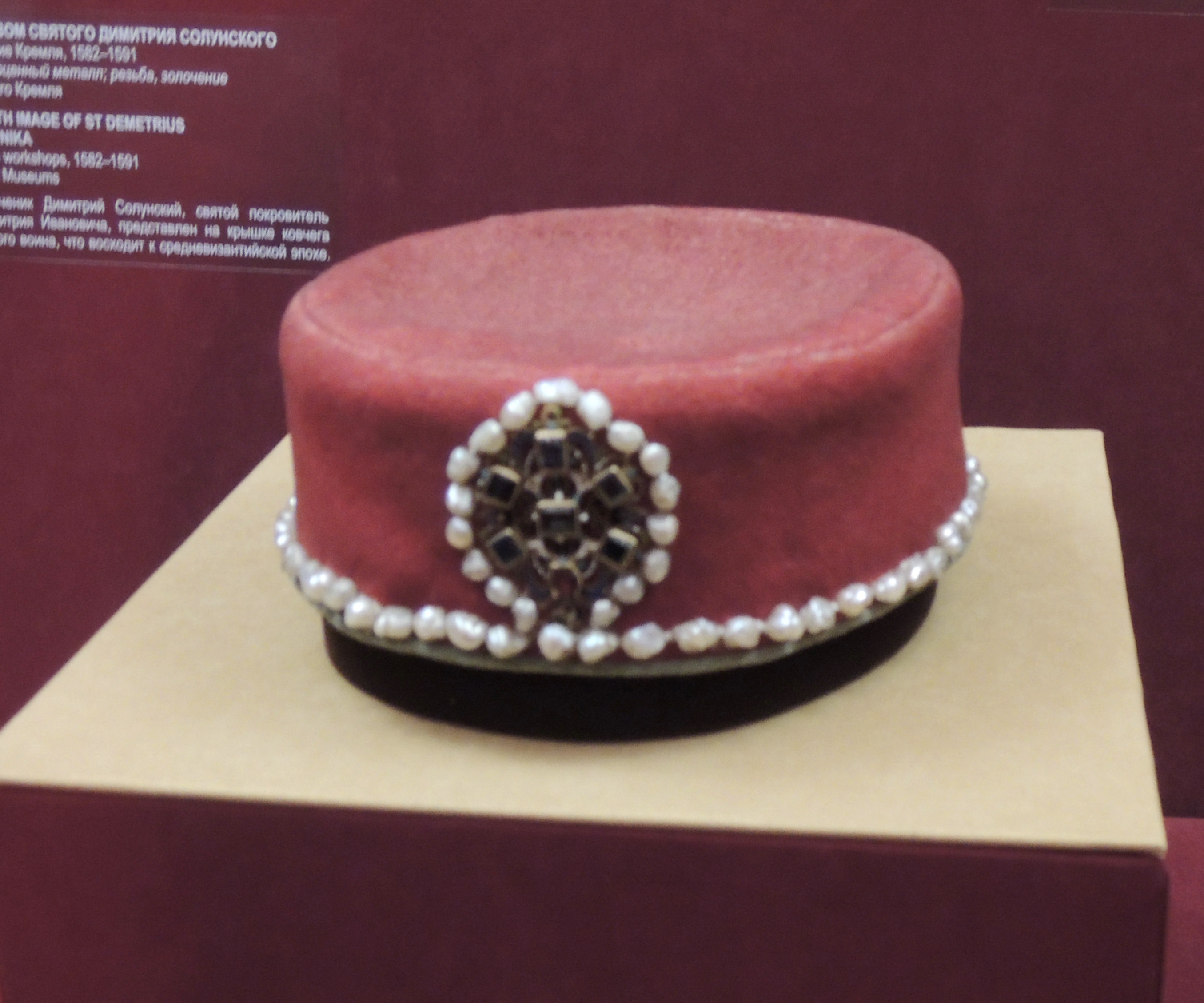 Шапочка. Россия, конец 16 века. Сукно - Англия (?), 16 век. Тафта - Восток, 16 век. Золото, драгоценнные камни, жемчуг, шитье, чеканка, эмаль. Музеи Московского Кремля. Шапочка царевича Димитрия изготовлена из вишневого сукна и украшена драгоценной ажурной запоной. Она находилась в Архангельском соборе Кремля при раке царевича вместе с другими приписываемыми ему вещами (ширинка, шелковый кошелек с 14 серебряными монетами и бумажный пакет с запечатанной в нем прядью волос).